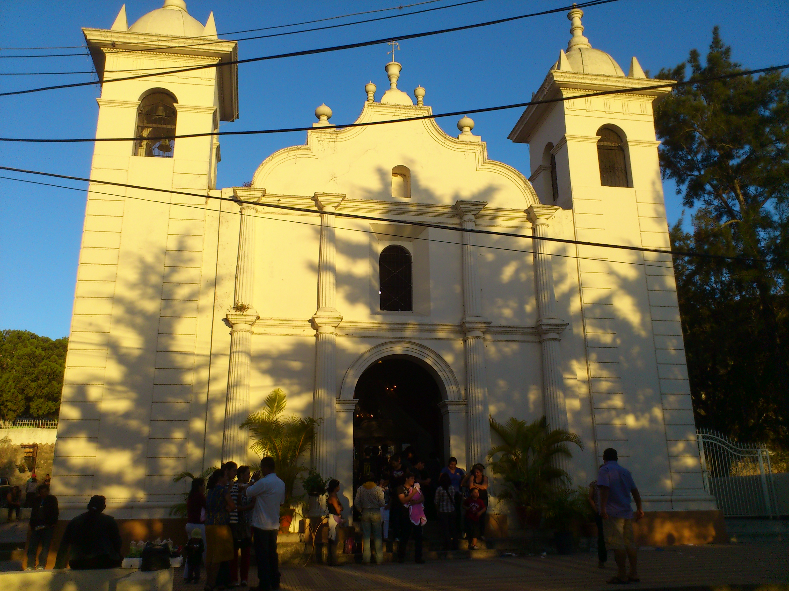 Iglesia de Santa Lucía